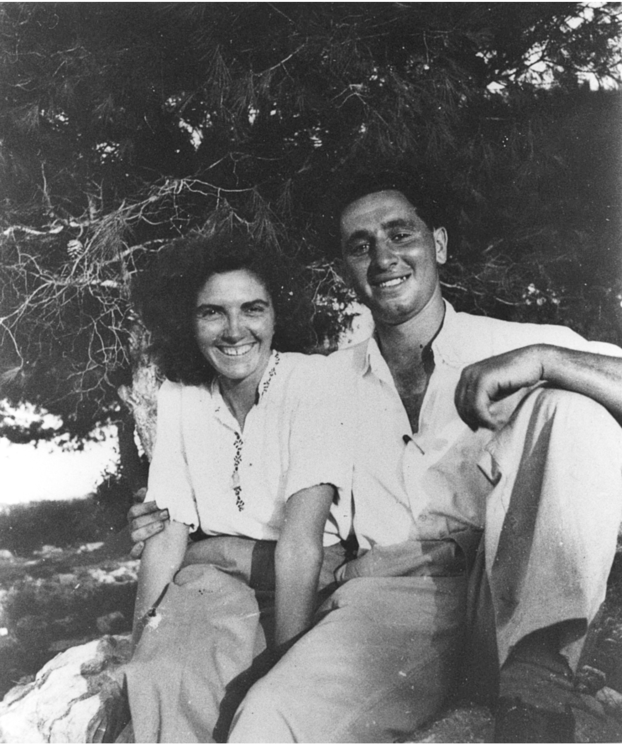 Shimon Peres with his girlfriend Sonia at the Noar Haoved (Working Youth) Summer Camp in Zichron Yaacov. שמעון פרס עם חברתו סוניה במחנה קיץ של תנועת הנוער העובד בזכרון יעקב.